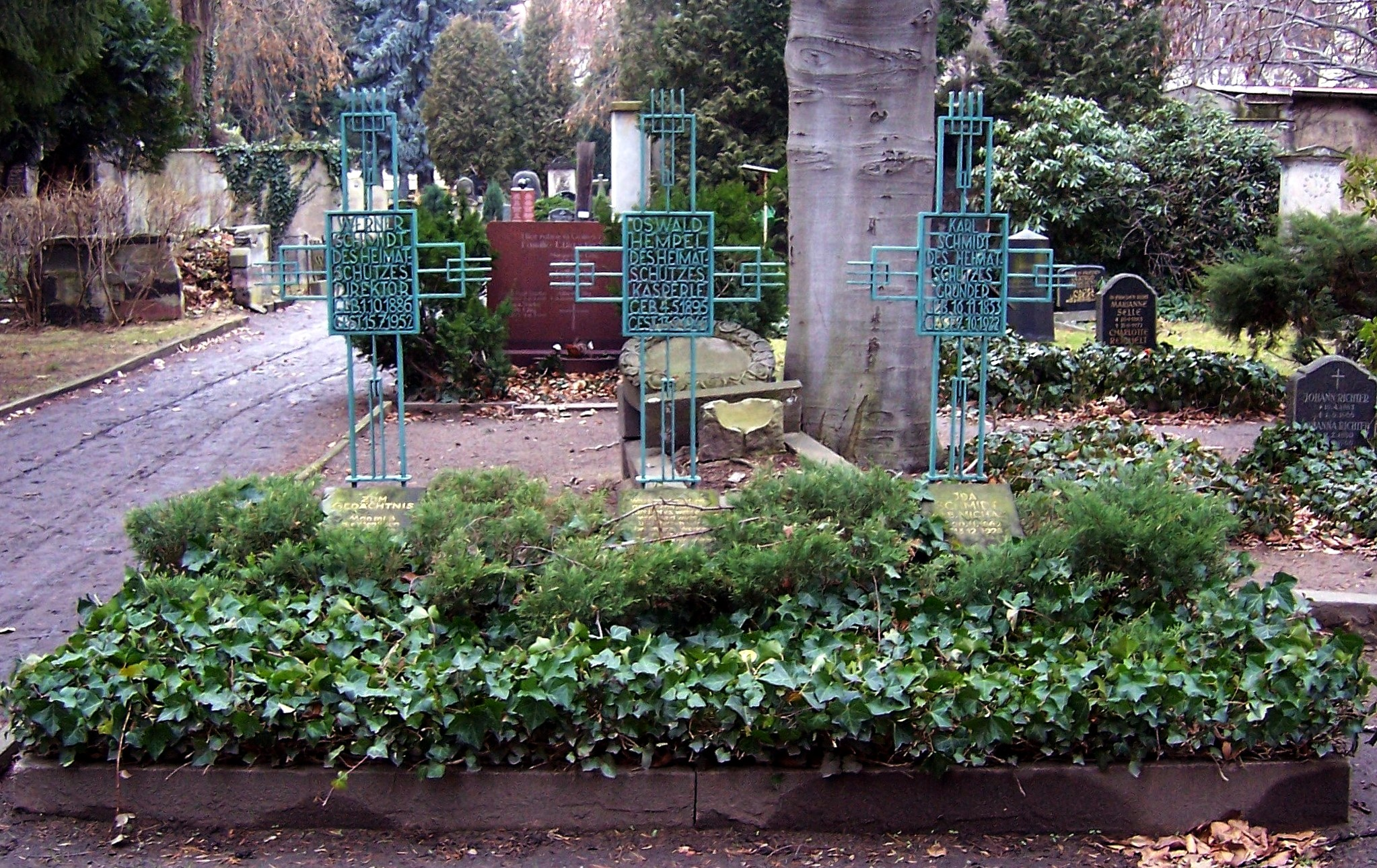 Gedenkstätte Sächsischer Heimatschutz auf dem Inneren Neustädter Friedhof in Dresden mit den Grabstätten von Karl Schmidt, Oswald Hempel (leer) und Werner Schmidt.